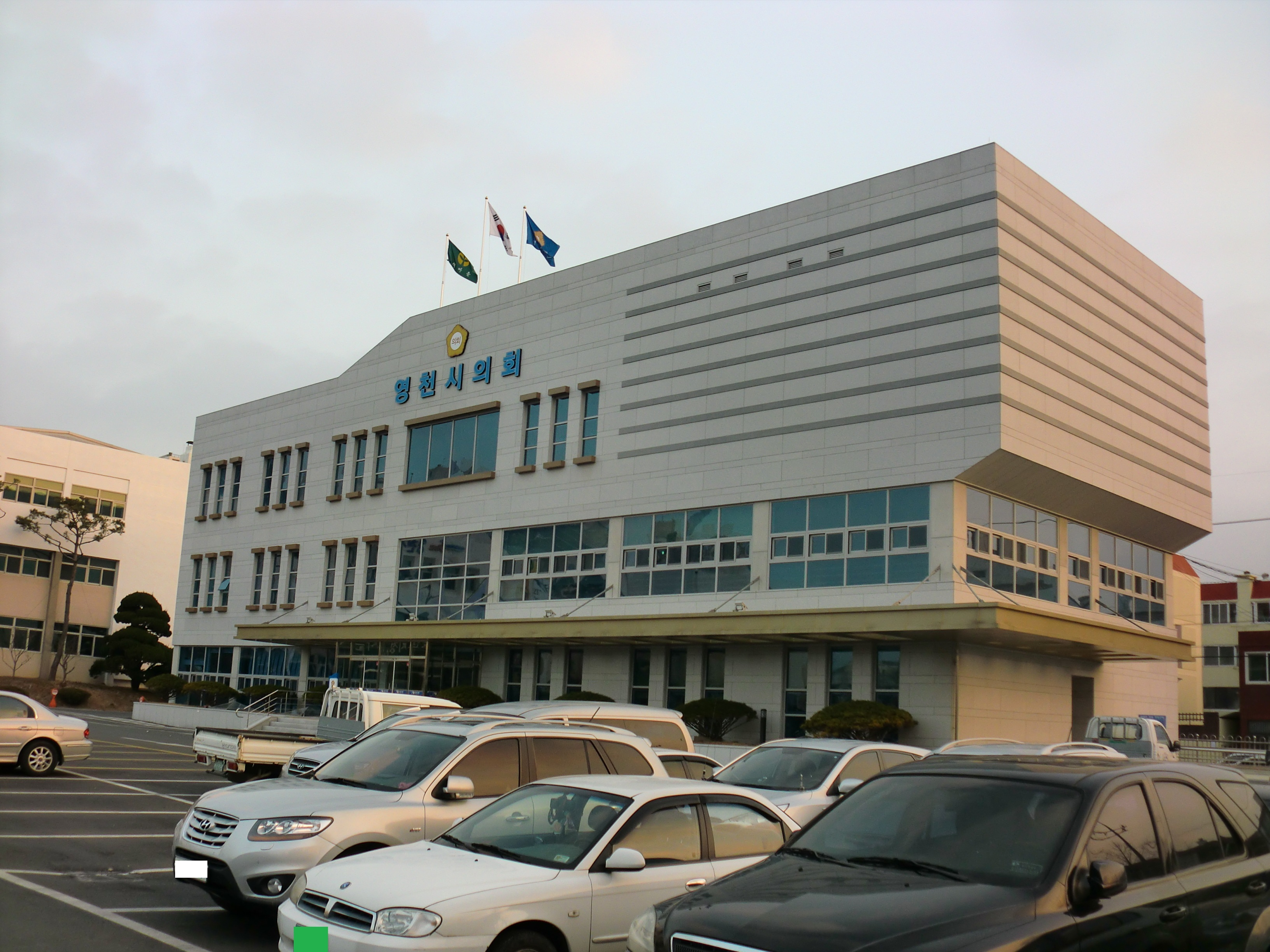 경상북도 영천시에 있는 영천시의회